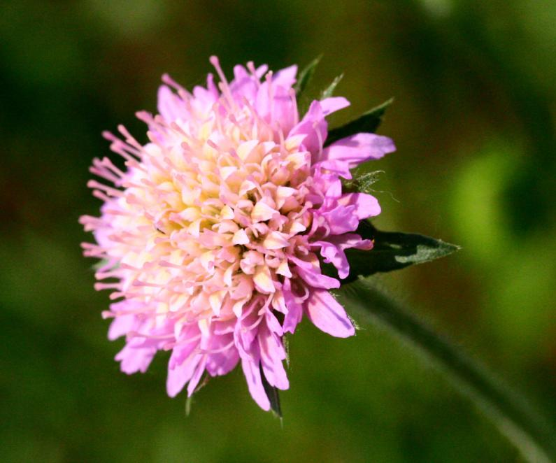 Knautia arvensis